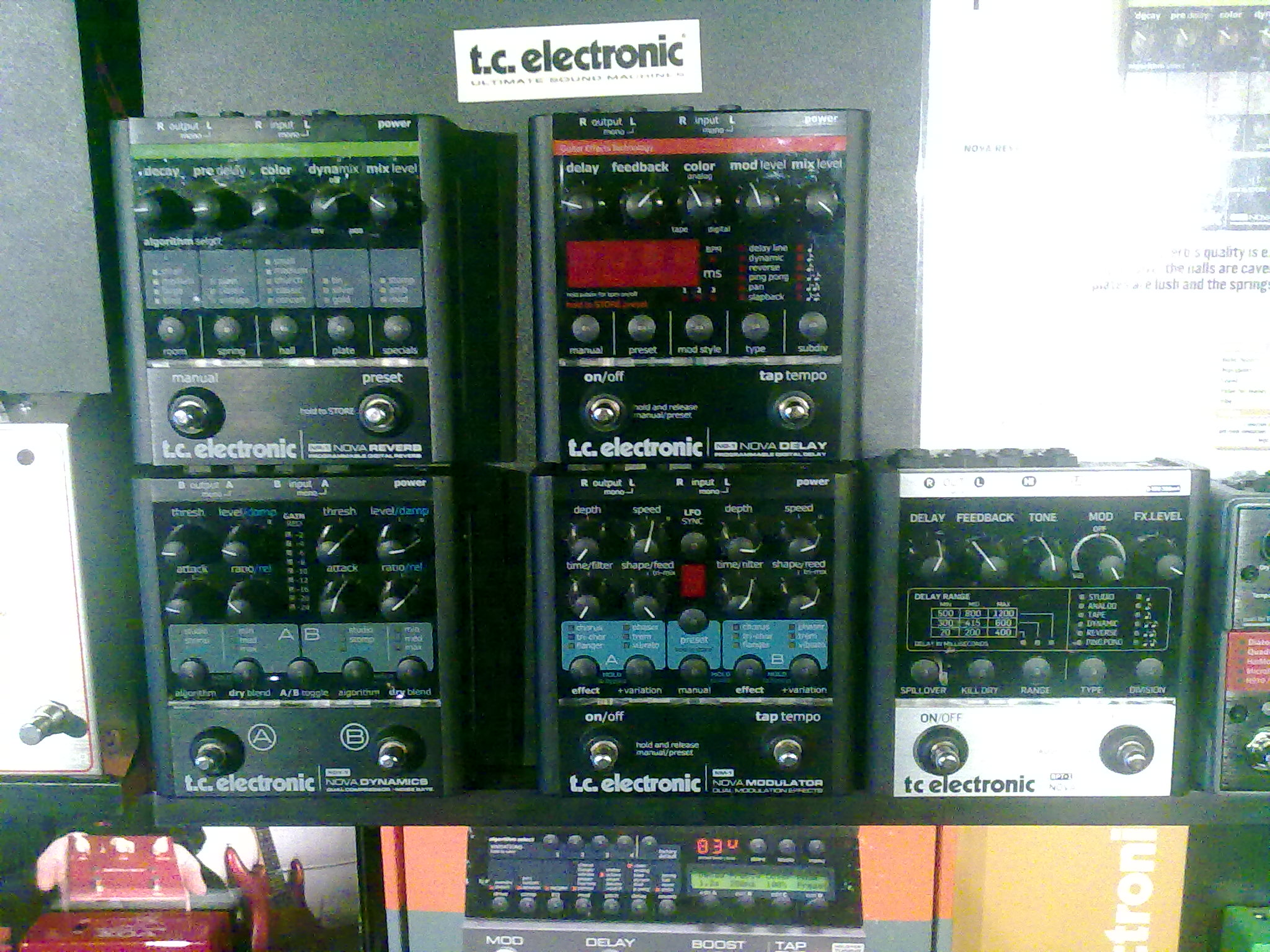 Effect pedals t.c. electronic